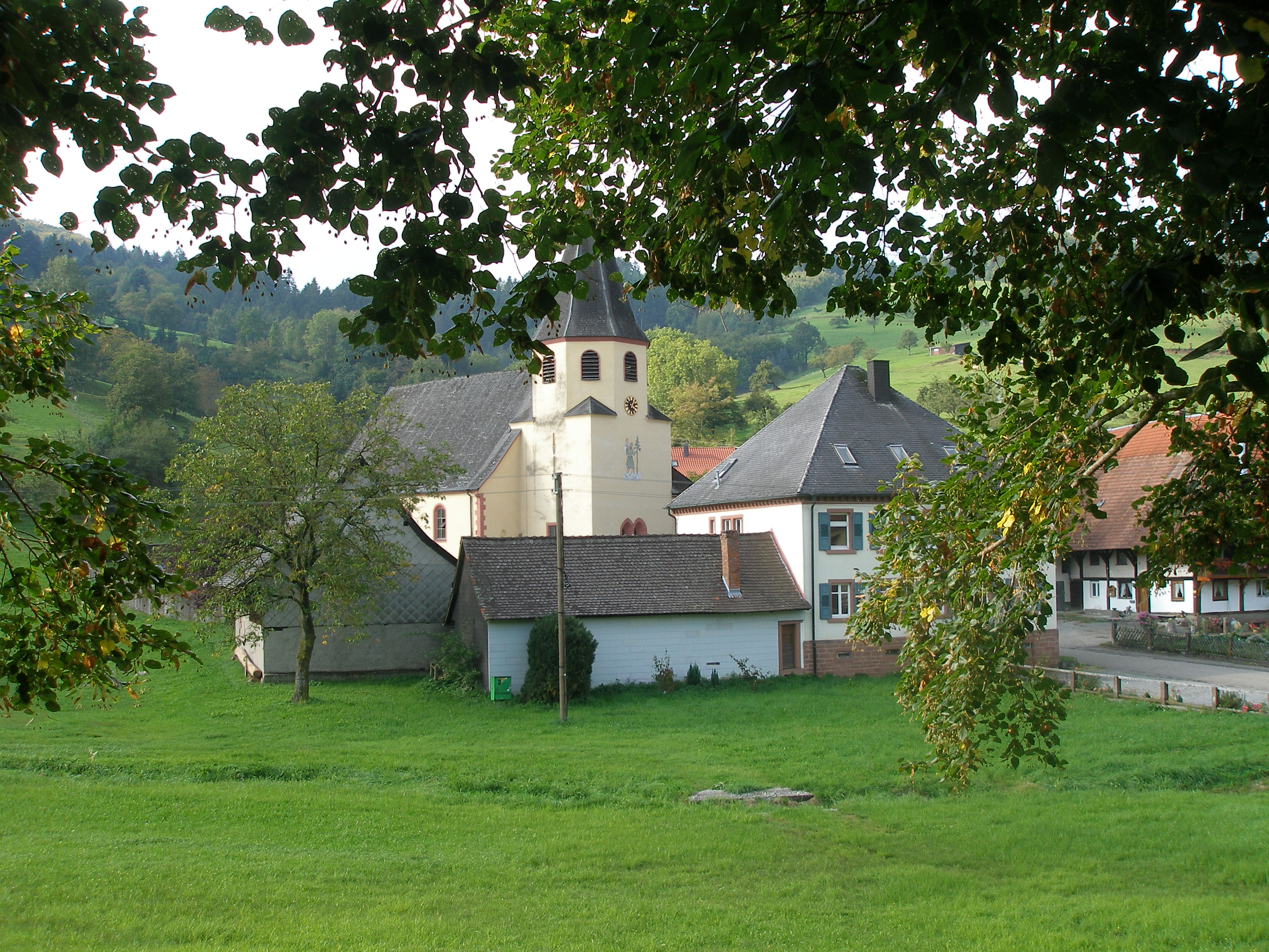 Prinzbach